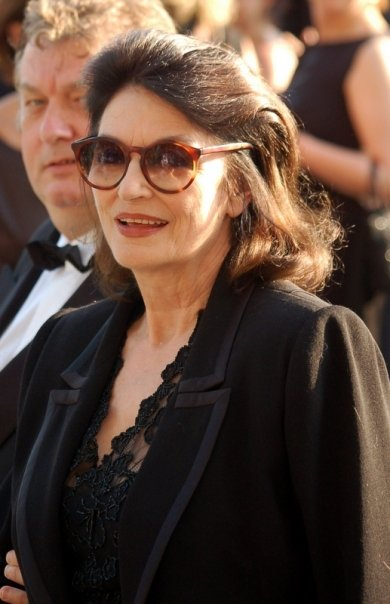 Anouk Aimée au festival de Cannes; au second plan, à demi caché, Dominique Besnehard